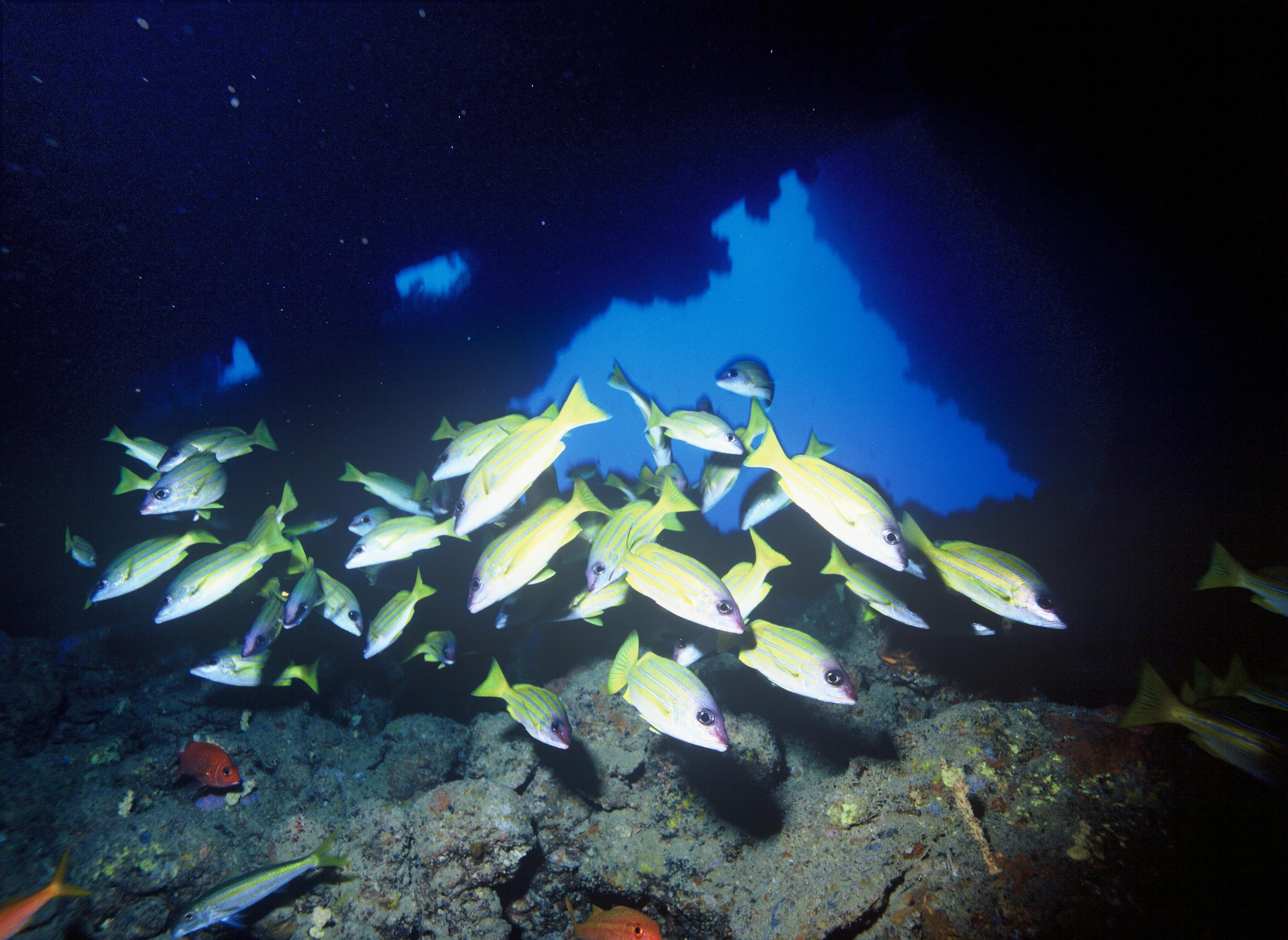 Afrikaanse diklippen